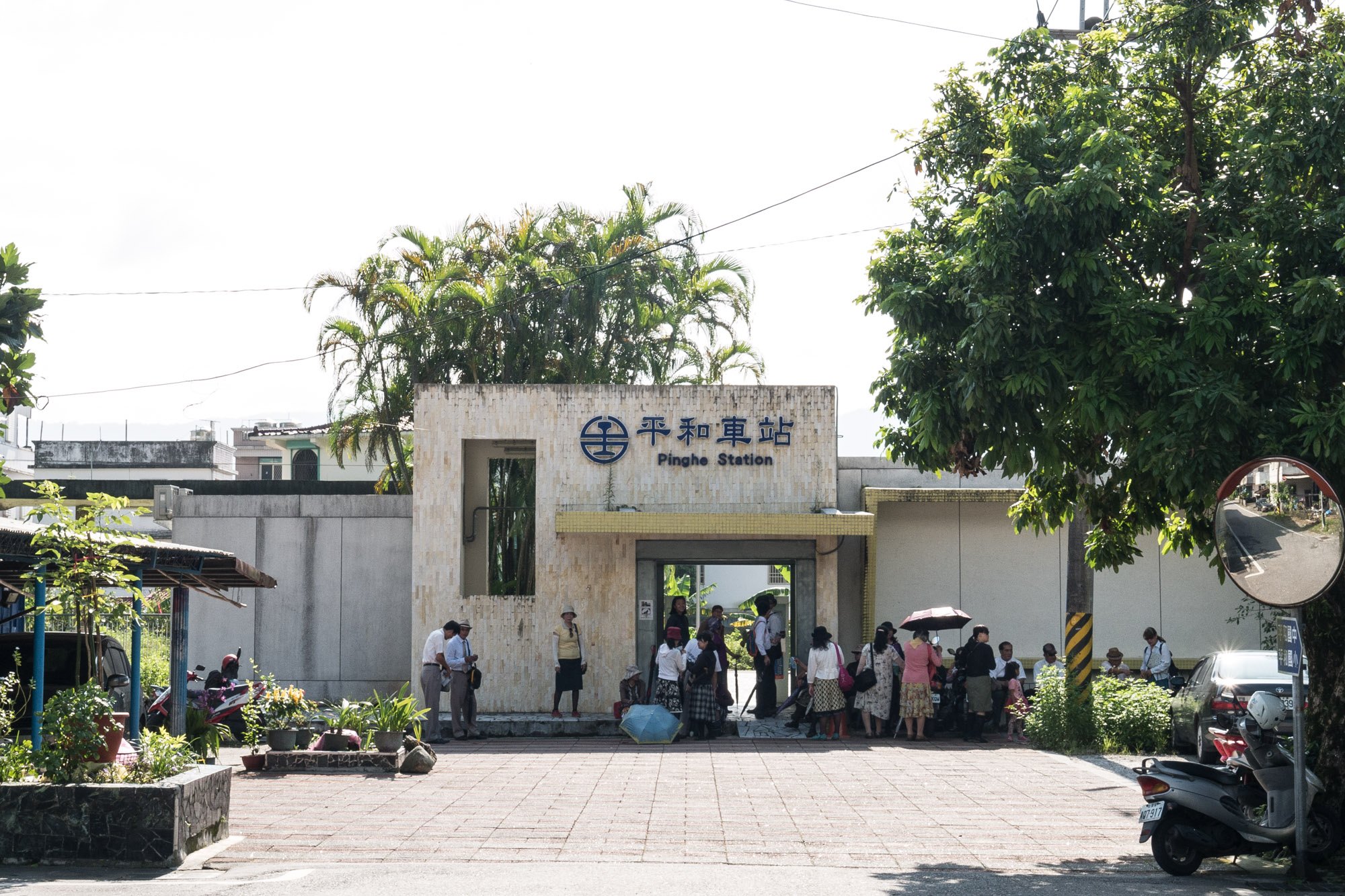 平和車站